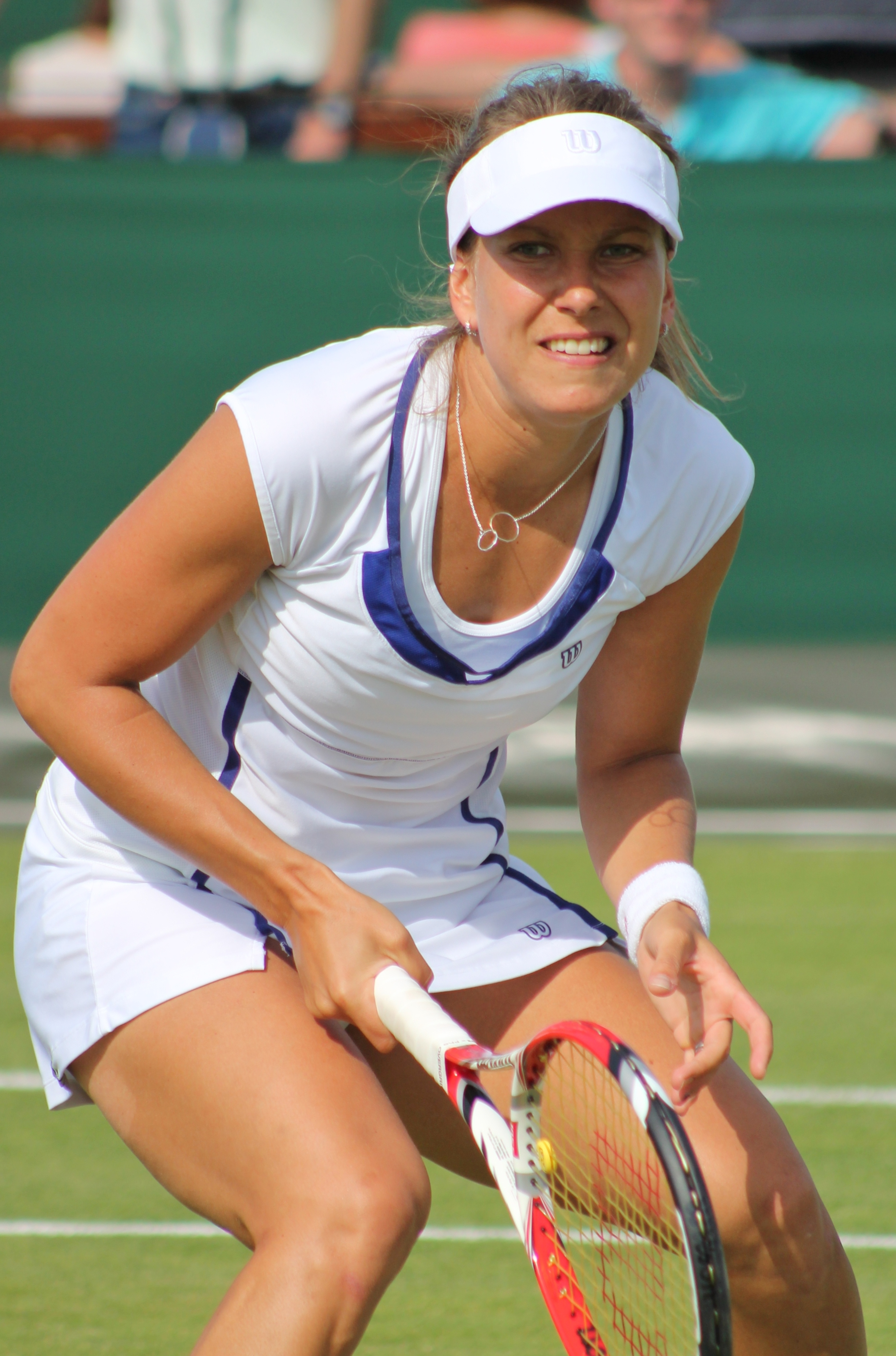 Barbora Záhlavová-Strýcová at 2013 Wimbledon